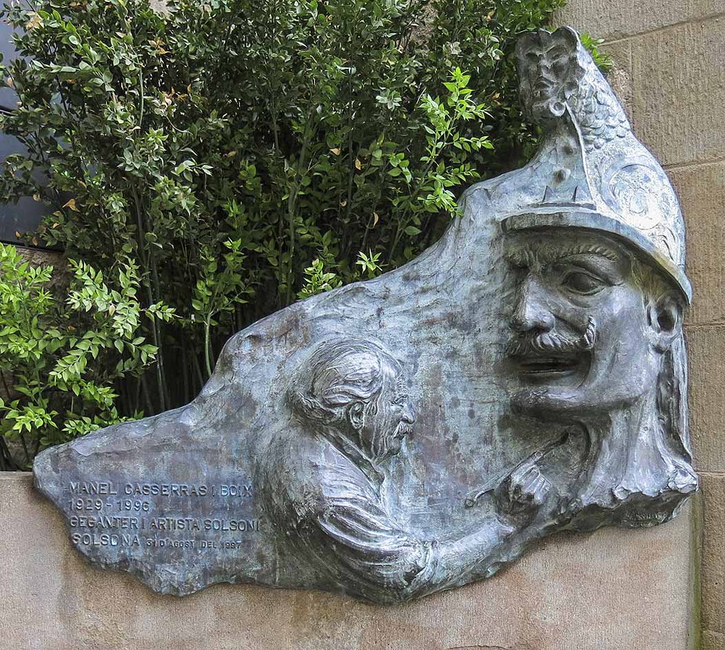 Manel Casserras i Boix (Solsona, 1929 – 1996), sastre de professió fou un dels més grans creadors d'imatgeria festiva de Catalunya. (Viquipèdia)